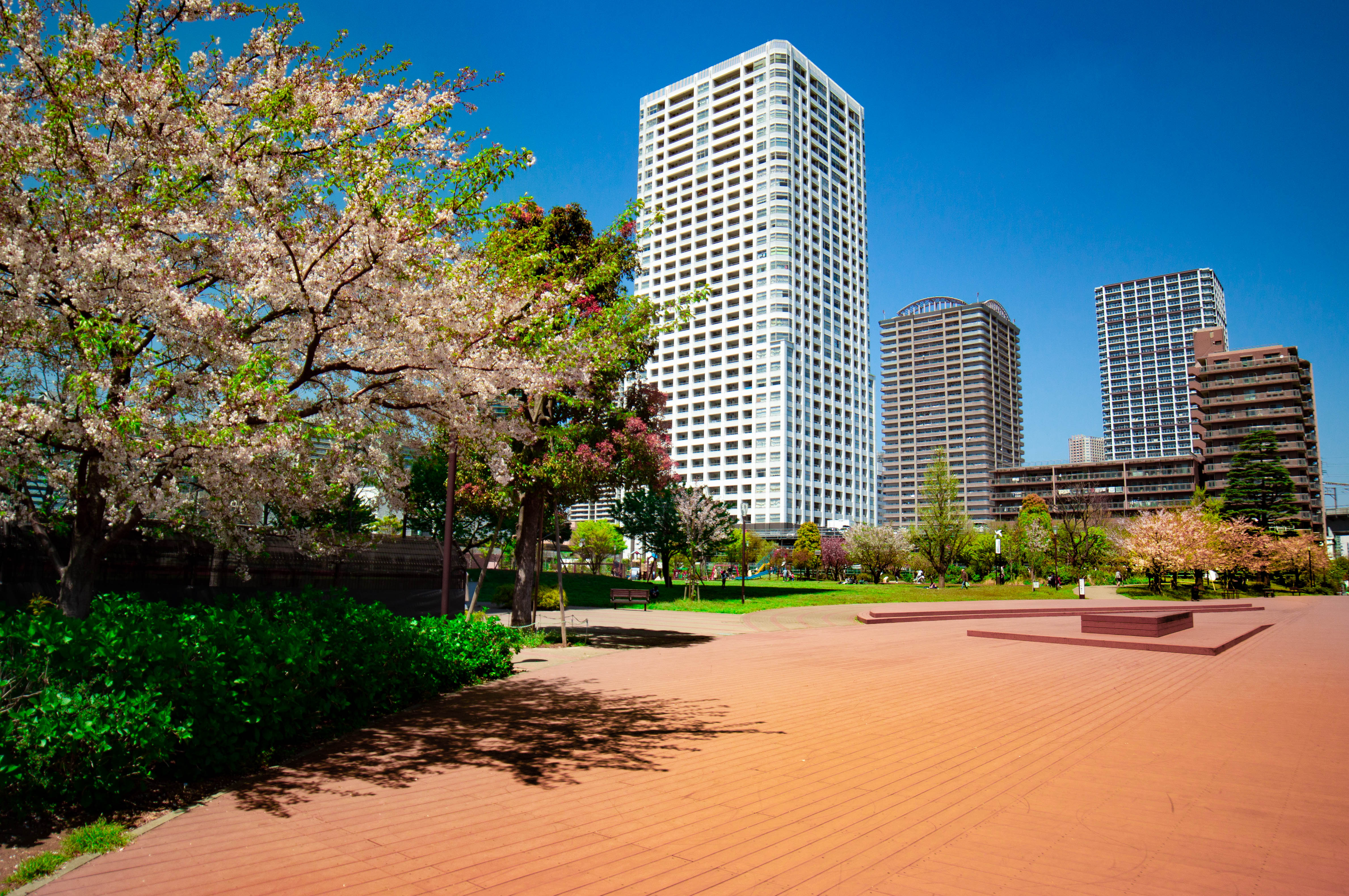 港南緑水公園東側から Sony SLT-A57